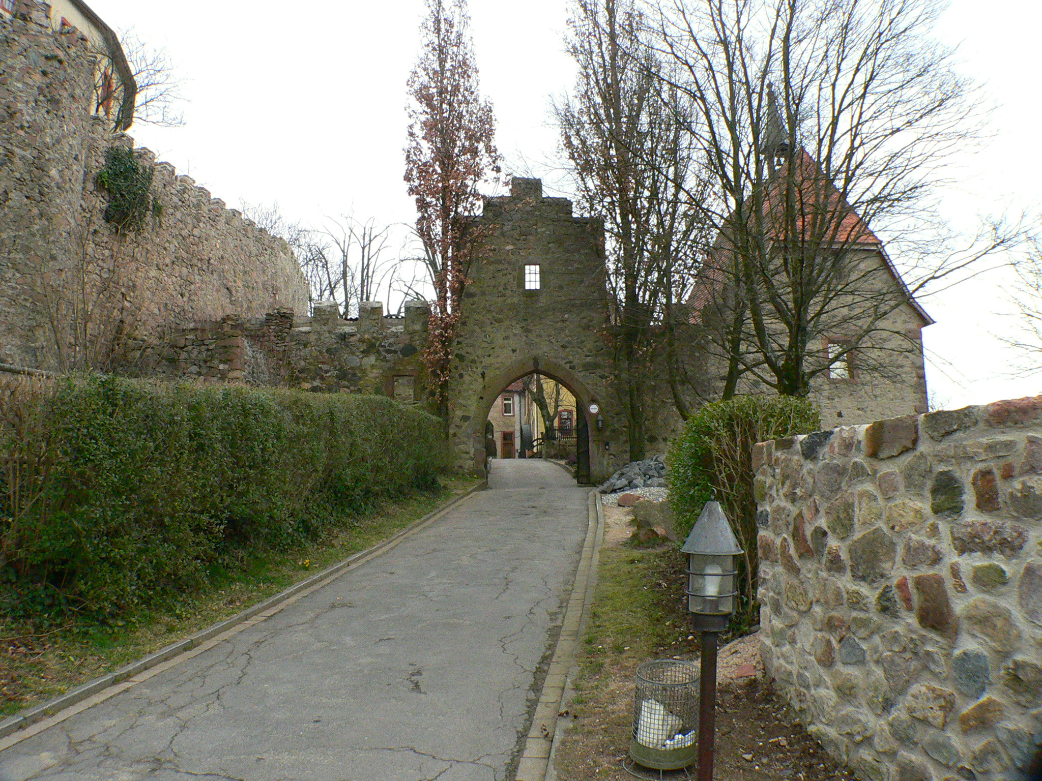 Eingang zum Schloss Reichenberg in Reichelsheim, Odenwald, Hessen